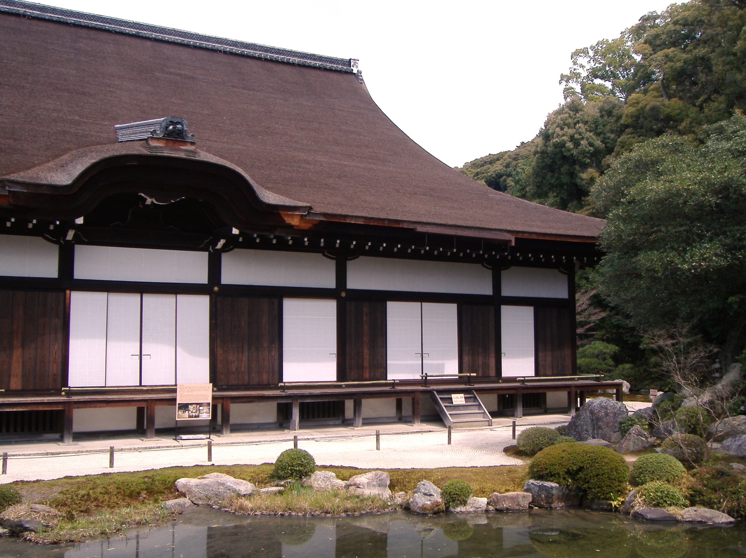 知恩院（京都市東山区） 大方丈